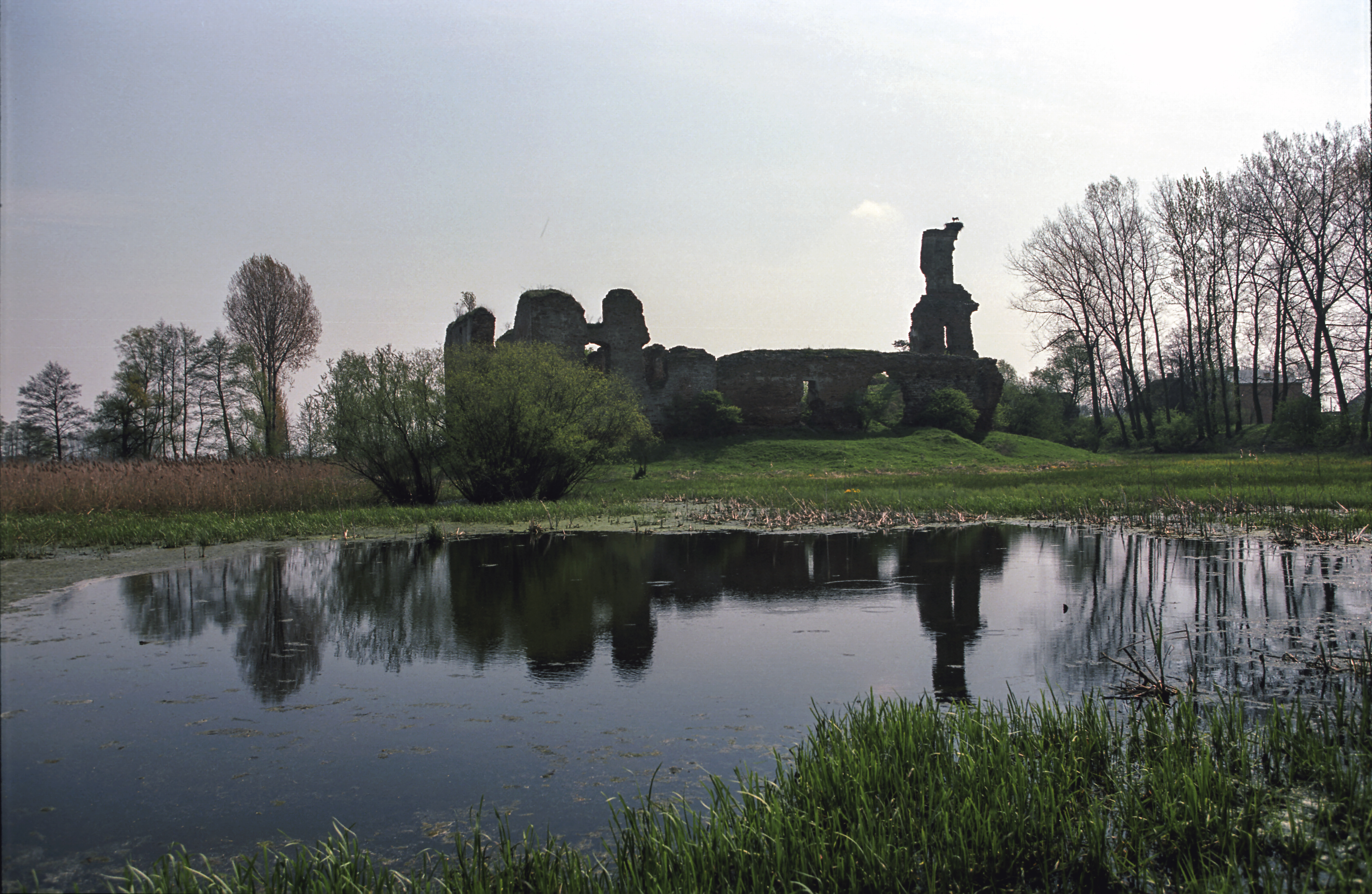 Besiekiery Castle, Poland